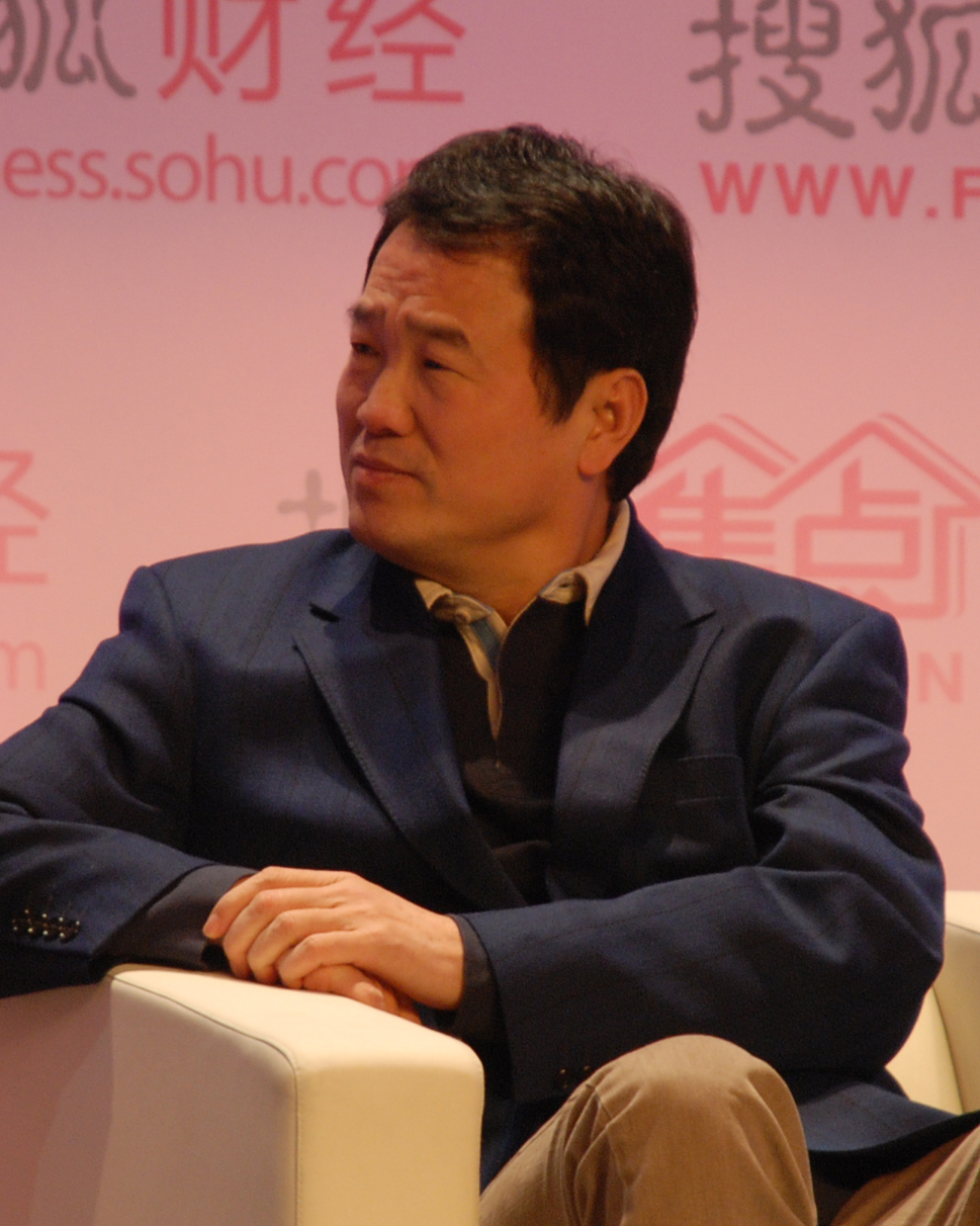 2012地产新视角黄怒波参加论坛